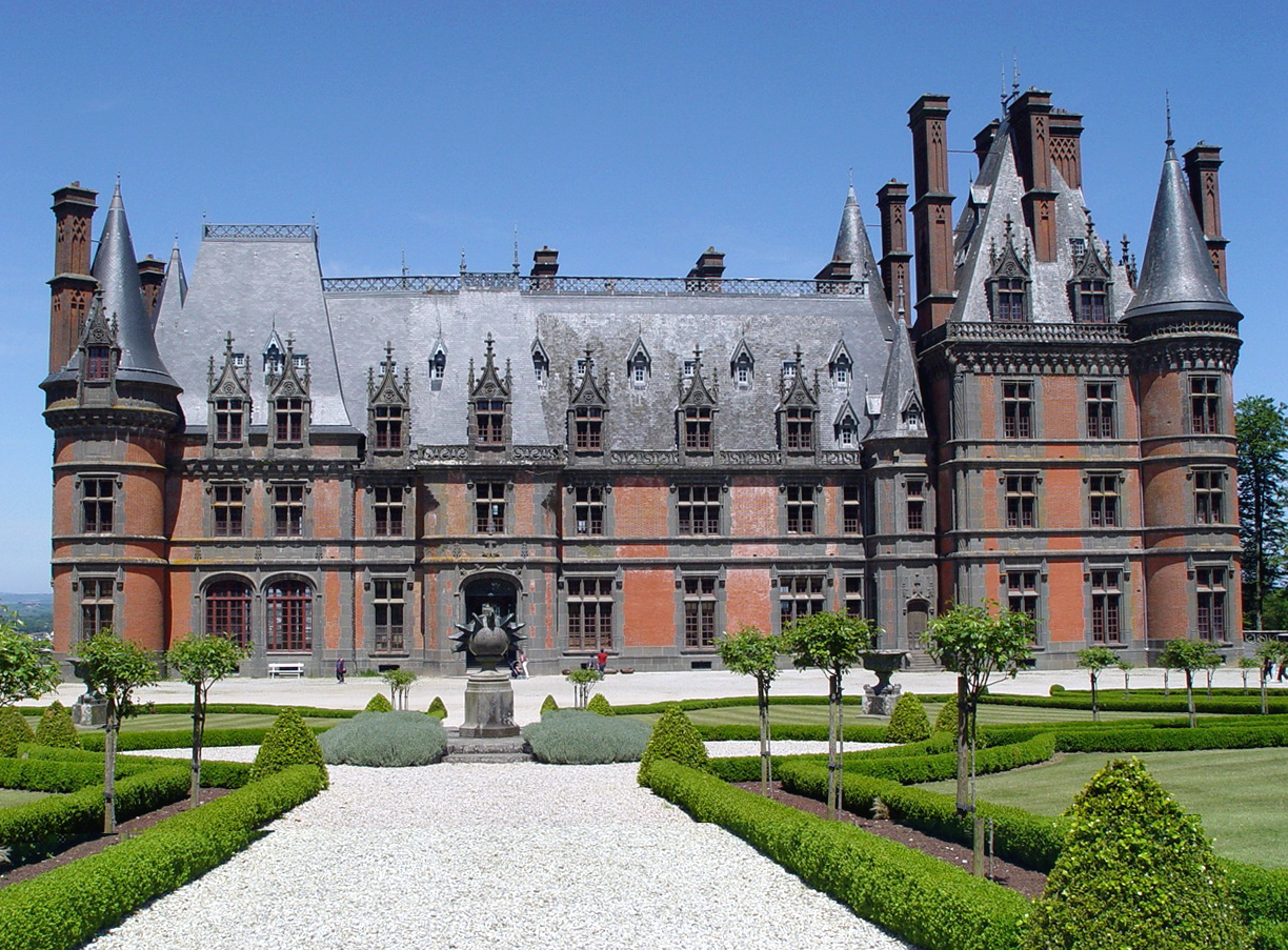 Saint-Goazec (Bretagne, Finistère) Château de Trévarez, façade sud.